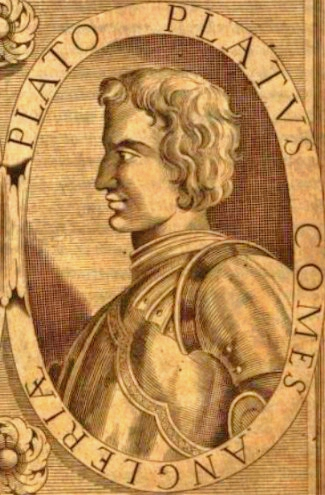 "Plato Platus Comes Angleriae". Retrato. Lombardo. Conde de Angleria. Conde Palatino. Marqués de la Santa Sede. Caballero de la Milicia Dorada. Señor Imperial de Parma y del Ceno. Plato Platoni (Borgo Val di Taro, ca. 980 - Borgo Val di Taro[10], ca. 1022).